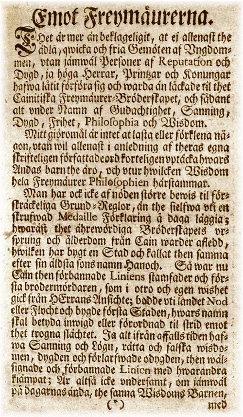 Framsidan av en av "Skevikska traktaterna", förbjudna genom kunglig förordning 1747.